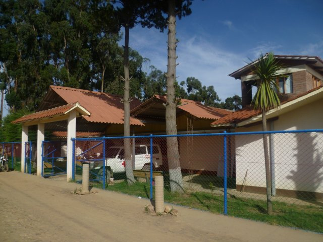 Hospital para primeros auxilios de Sacabamba